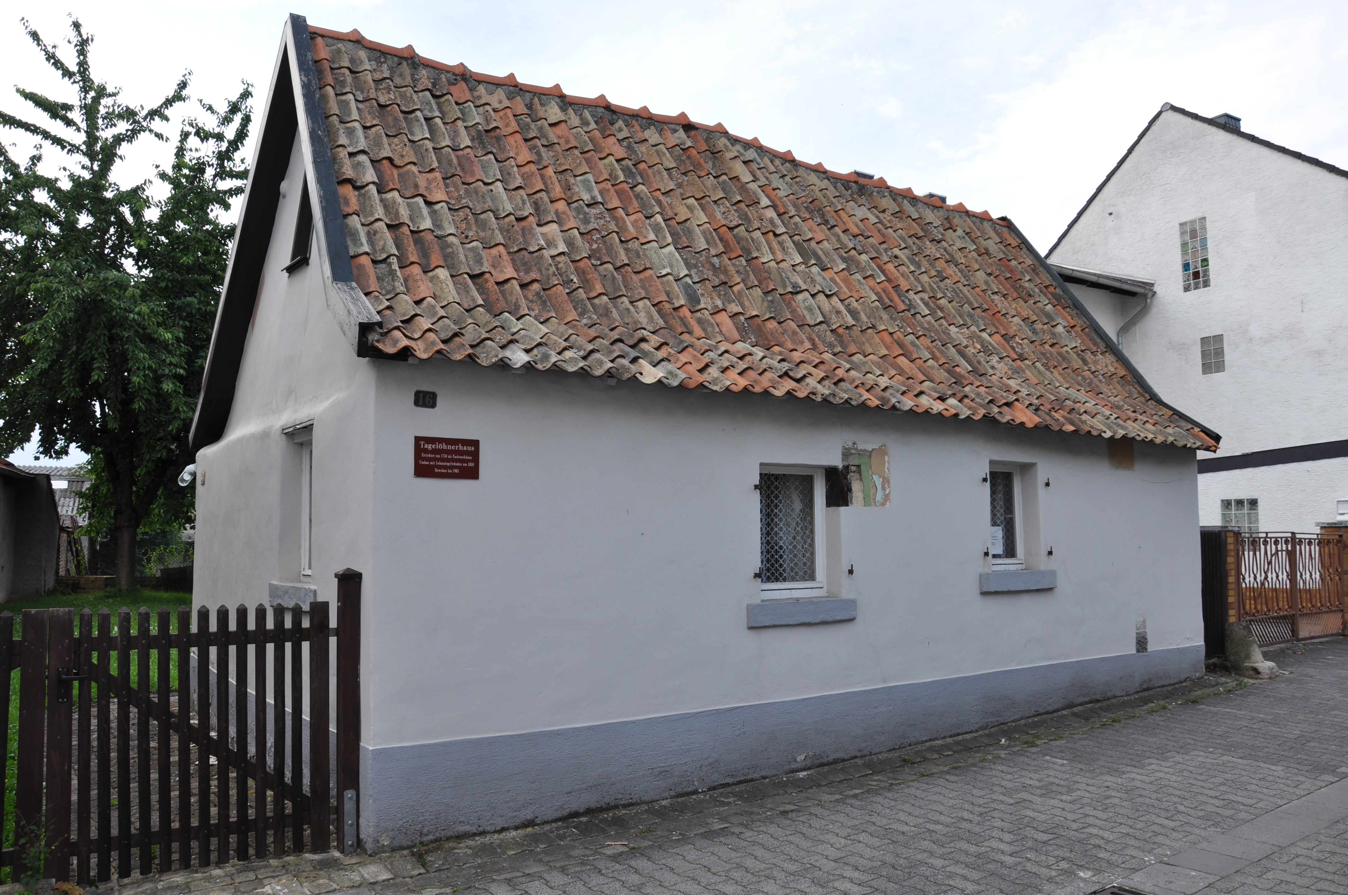 Tagelöhnerhaus